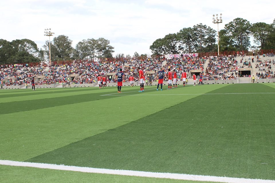 Club Tepatitlan